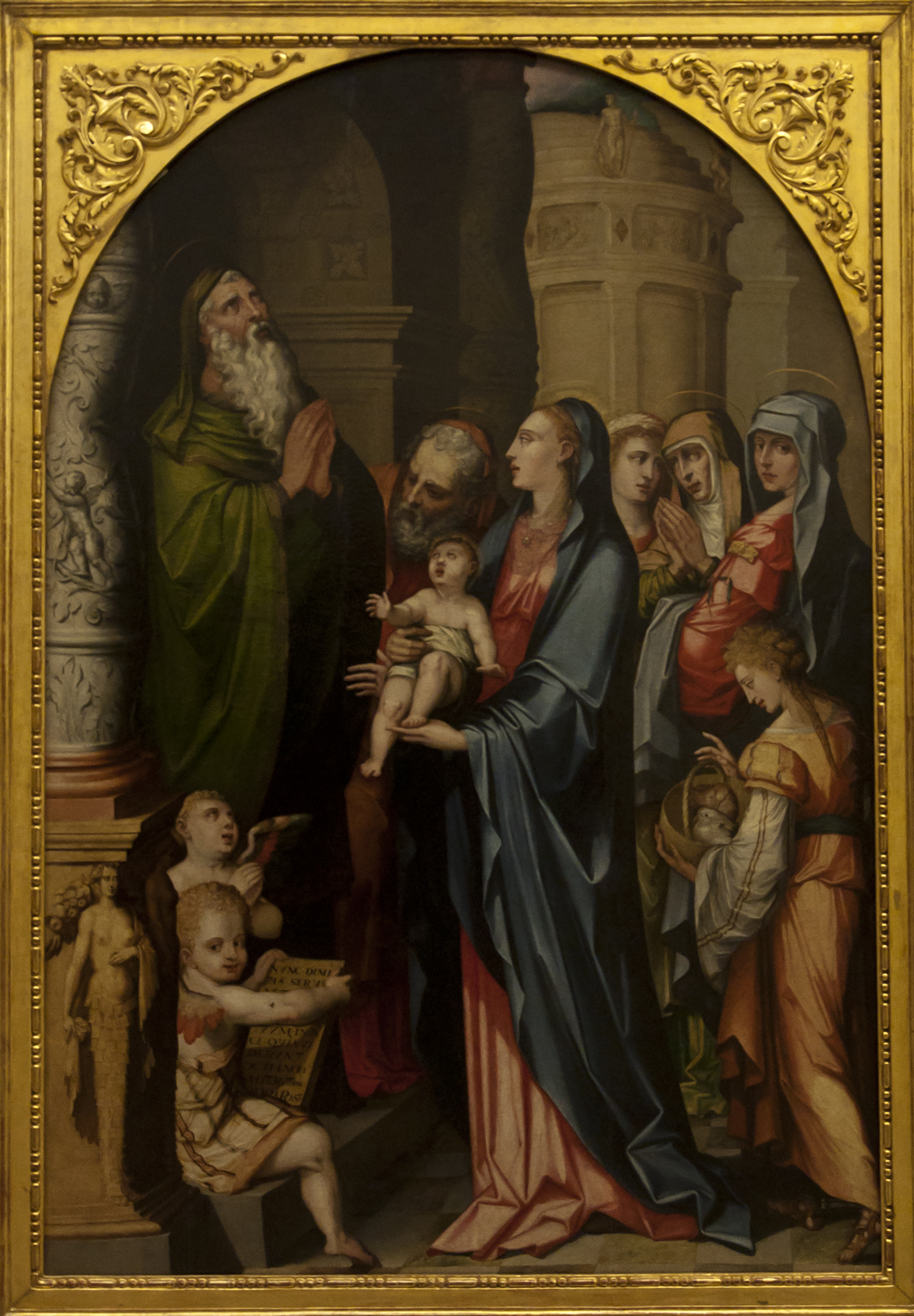 De ablutie